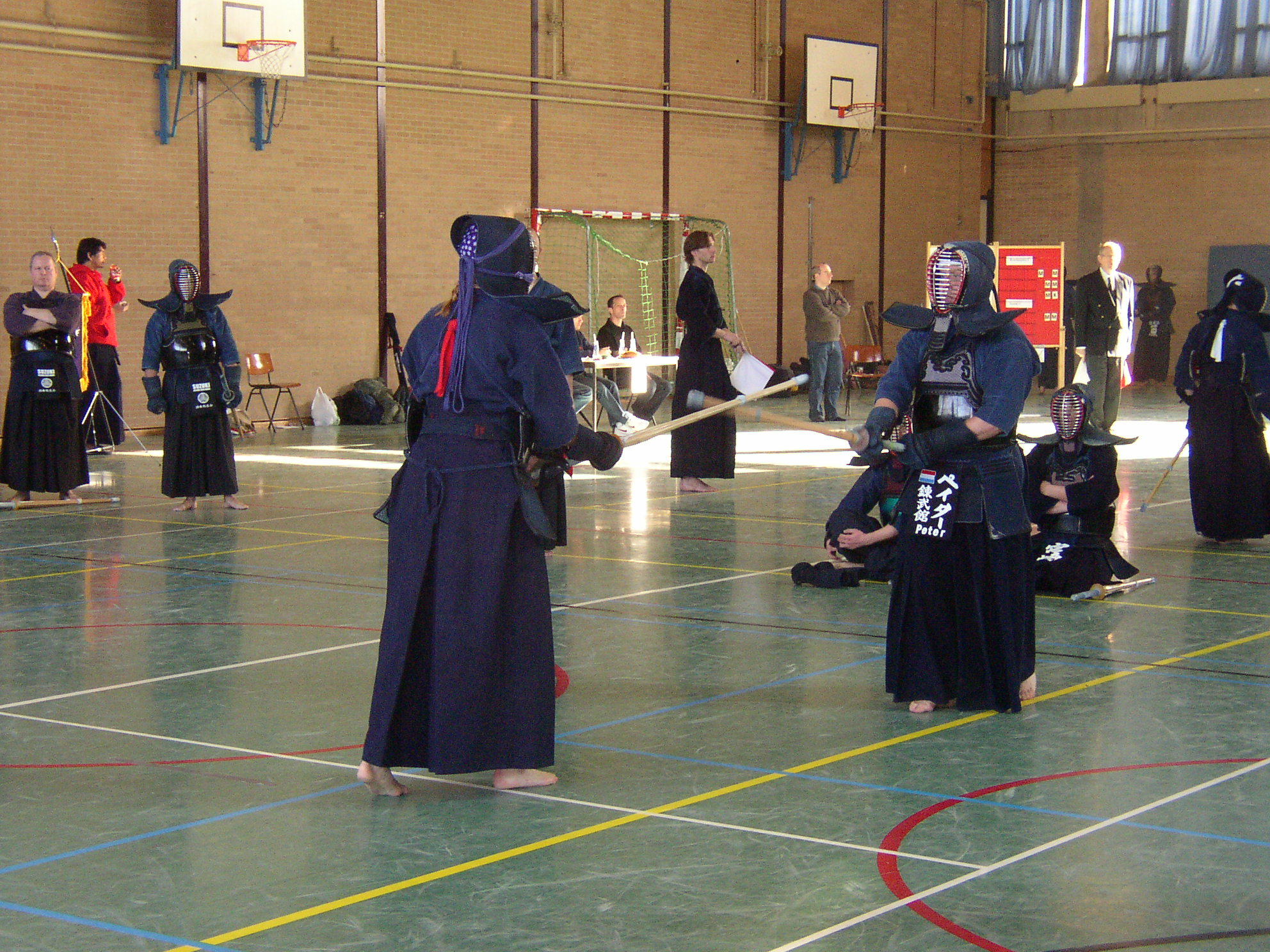 foto van mezelf uit eigen collectie